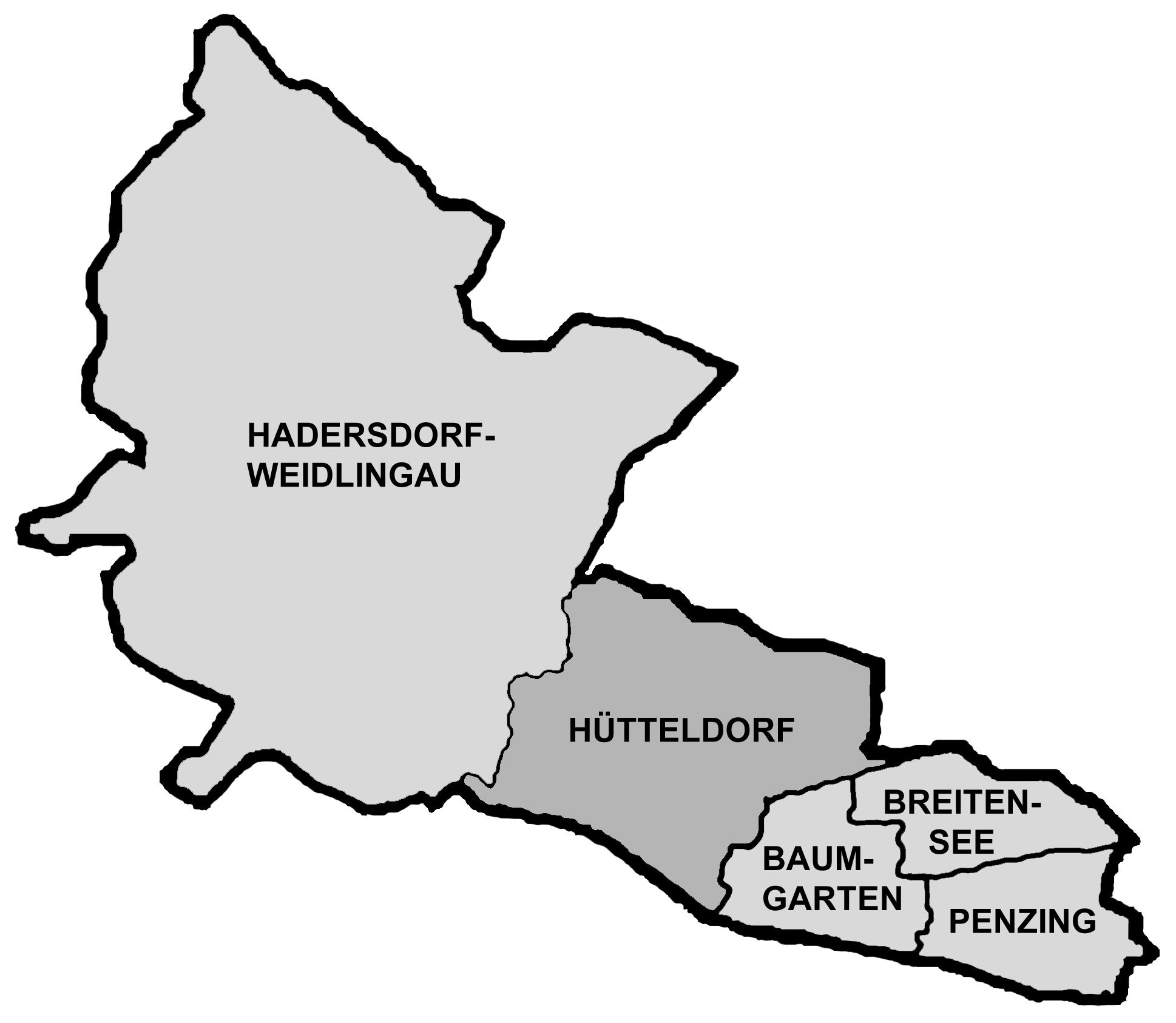 Positionskarte des Penzinger Bezirksteils Hütteldorf in Wien